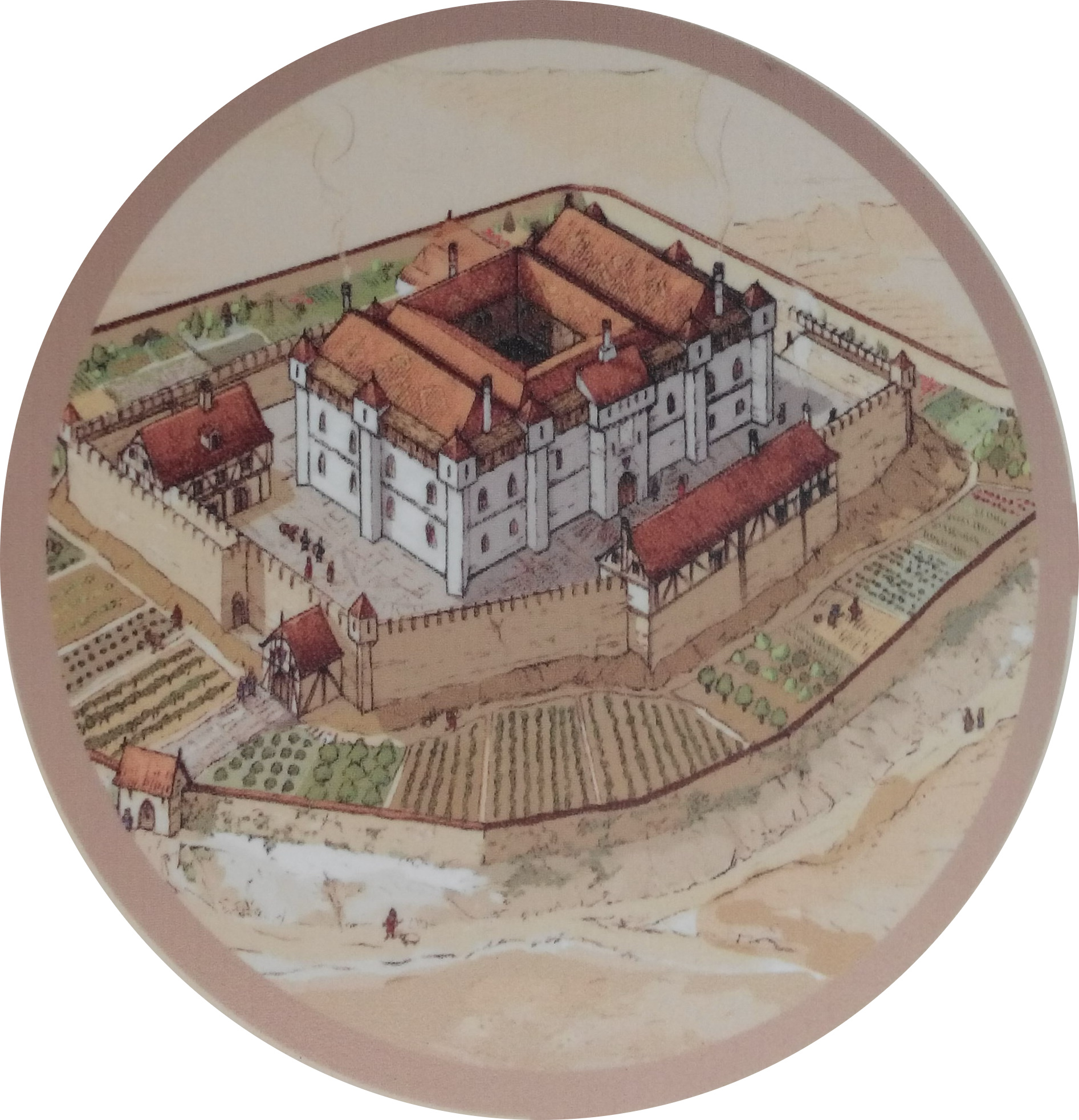 Imagen tomada del panel expuesto en el monumento